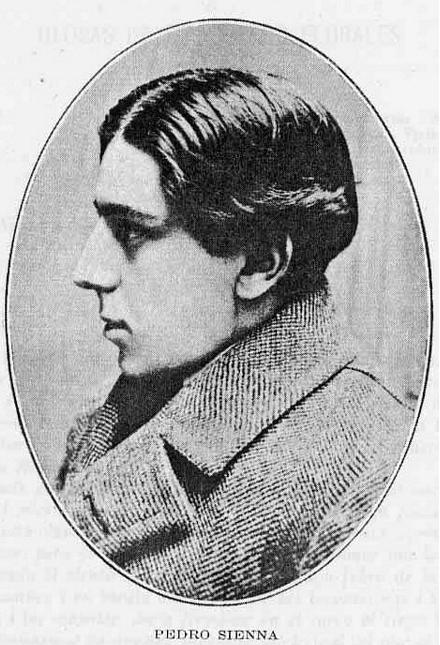 Pedro Sienna, cuyo nombre real era Pedro Pérez Cordero (San Fernando, 13 de mayo de 1893 - Santiago, 10 de marzo de 1972), fue un poeta, dramaturgo, periodista, crítico de arte, actor de teatro, productor, actor y director de cine mudo chileno.